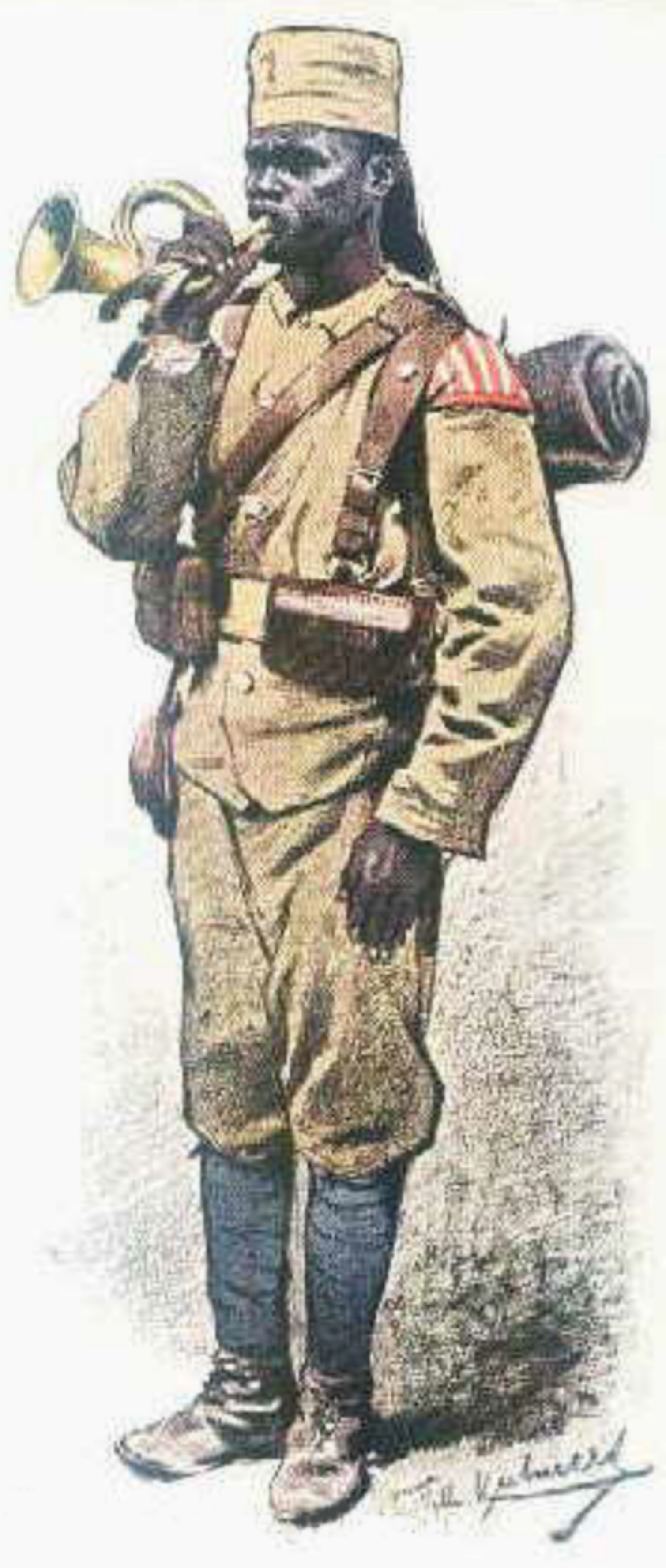 Askari-Trompeter der Schutztruppe in Deutsch-Ostafrika, vor 1914. Darstellung von Richard Knötel (1857-1914).